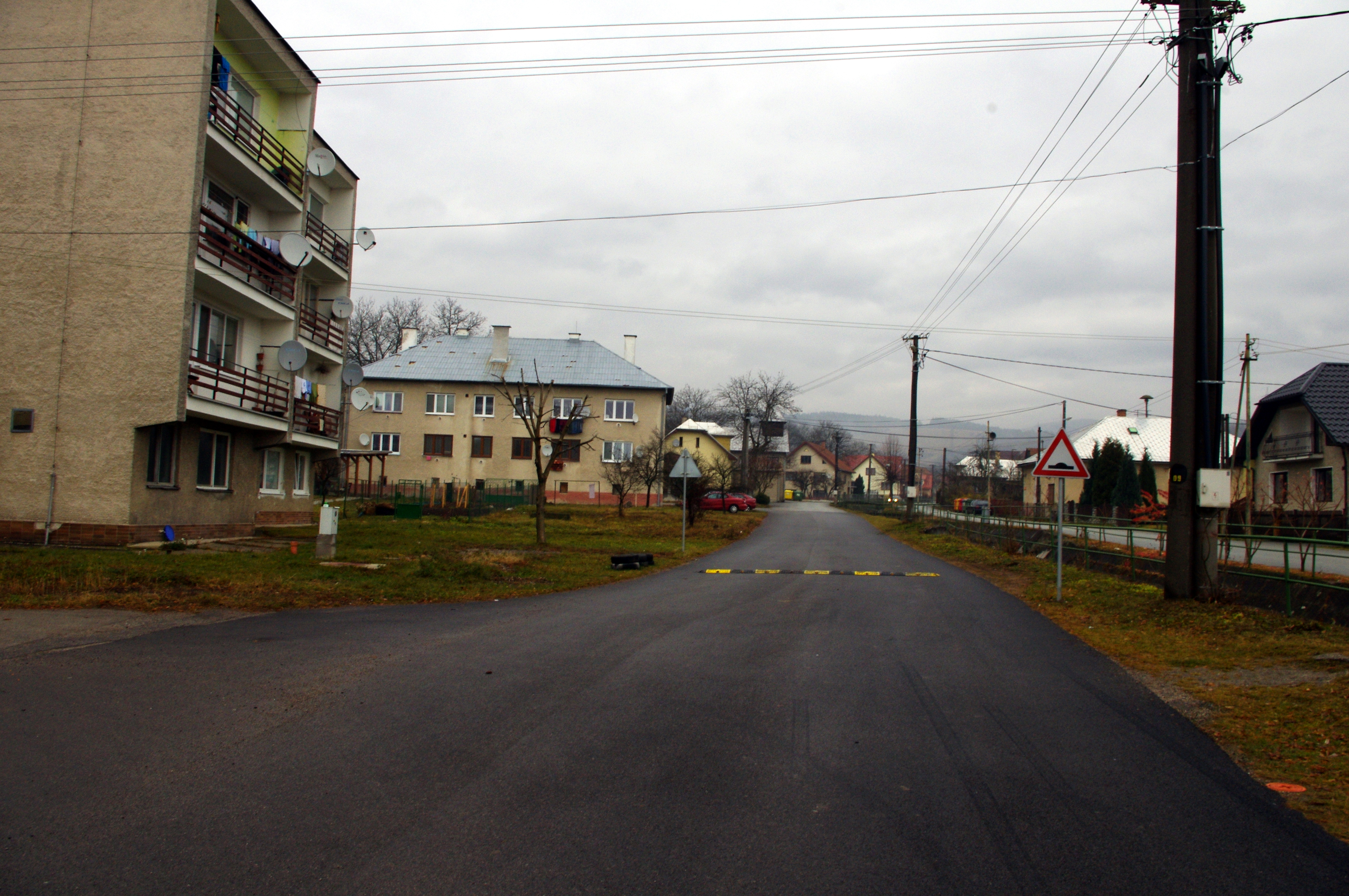 Ulica